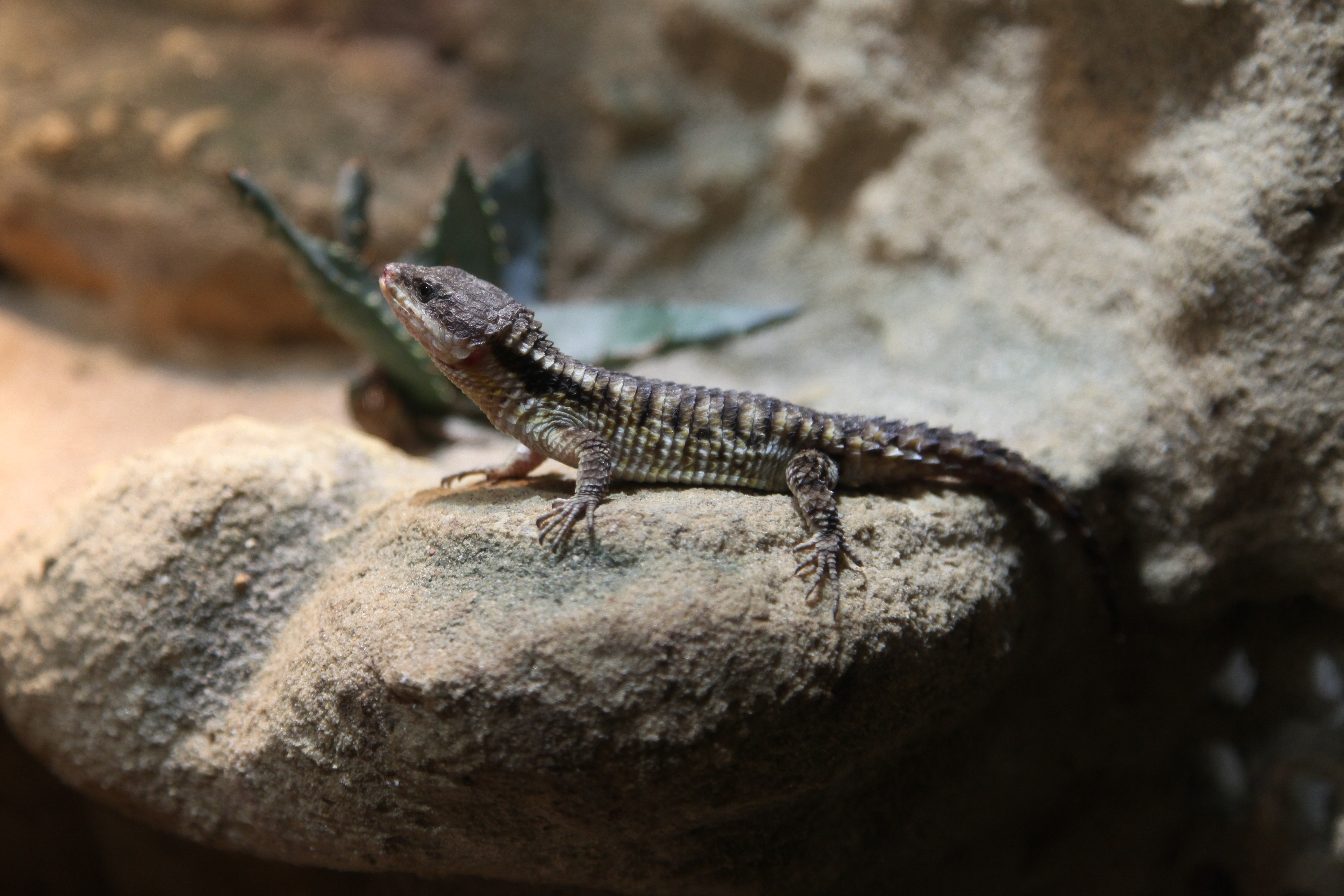 Cordylus tropidosternum im Aquazoo - Löbbecke Museum in Düsseldorf